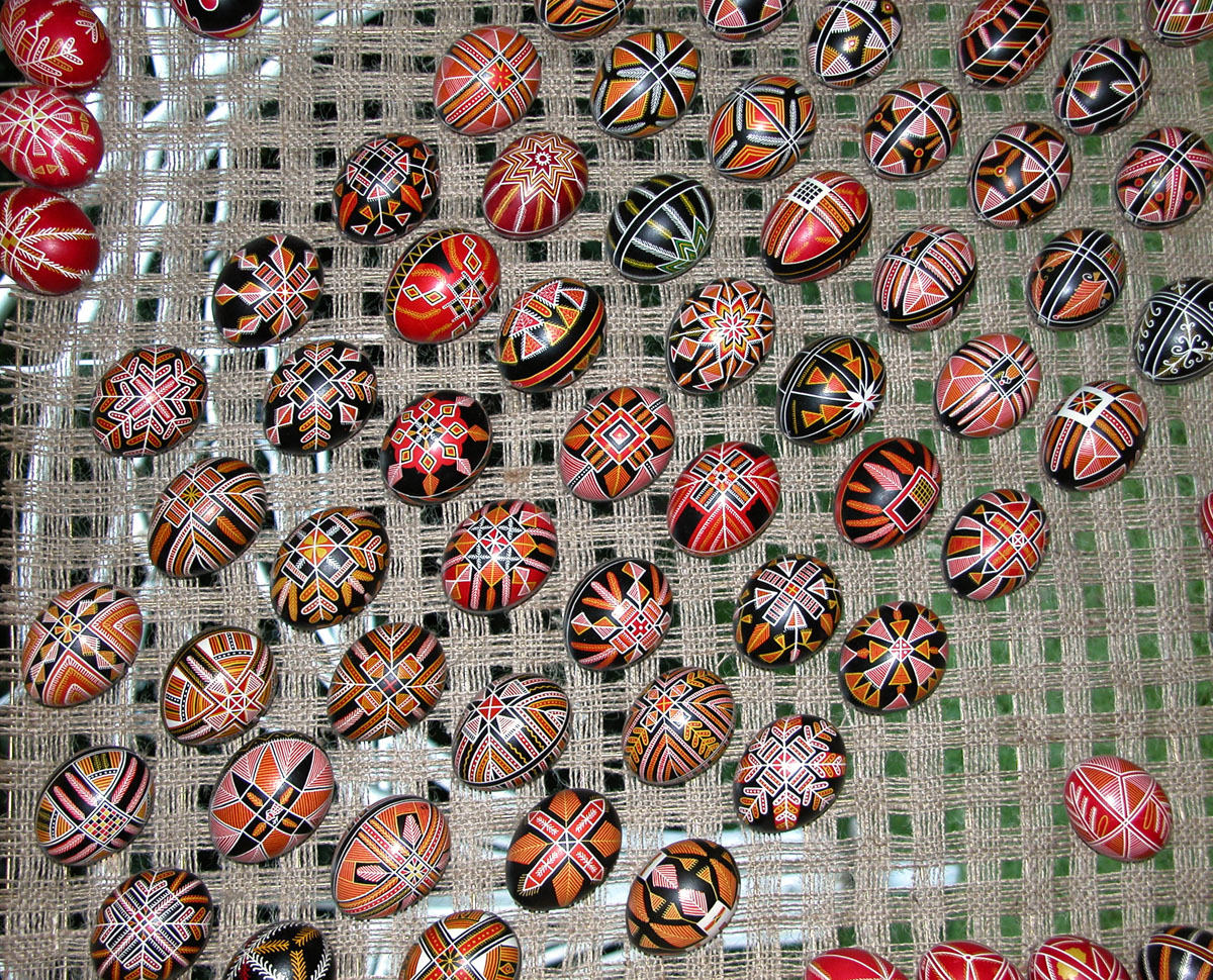 Писанки Курщини роботи Оксани Білоус